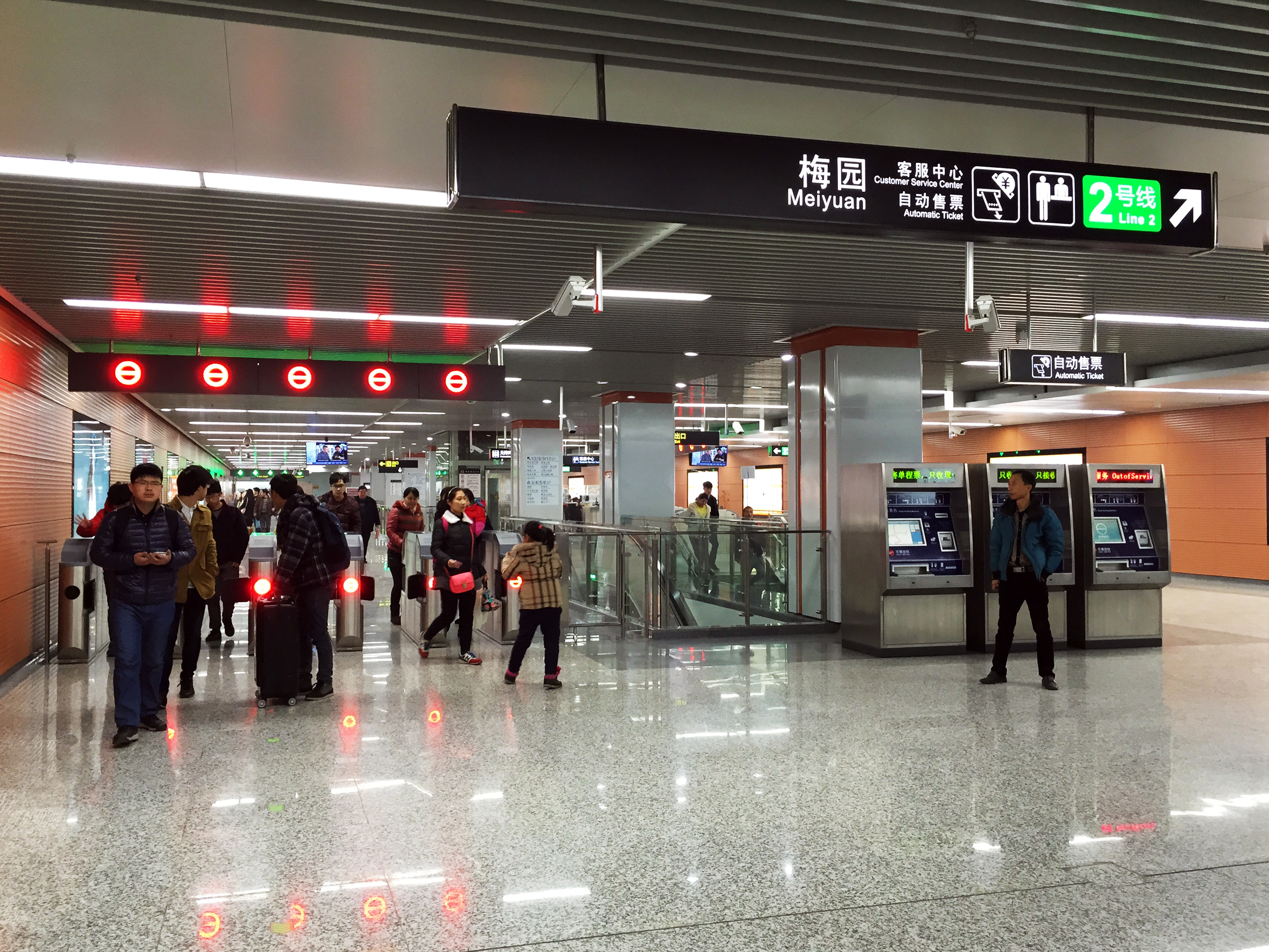 无锡地铁梅园开原寺站站厅